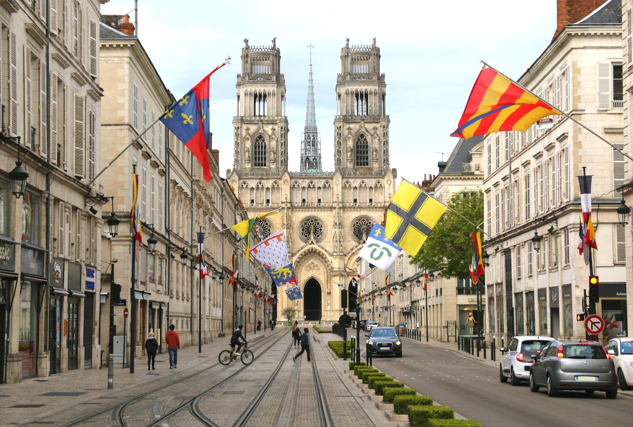 Rue Jeanne d'Arc, Orléans, Mai 2017.